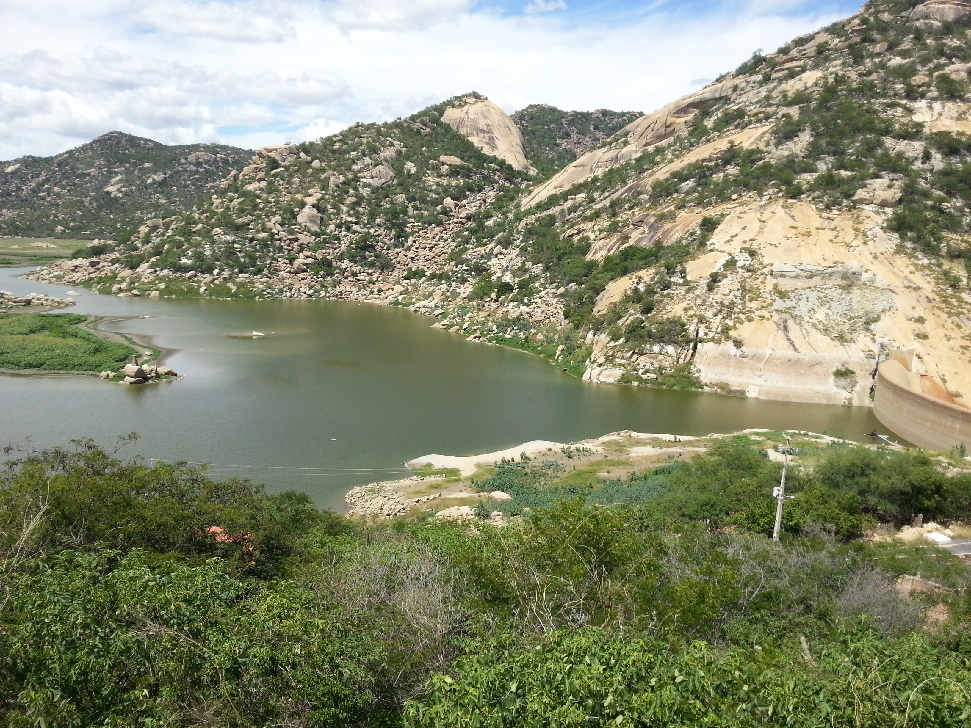 Açude Gargalheiras, Acari